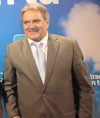 Camps i Rus a Sueca